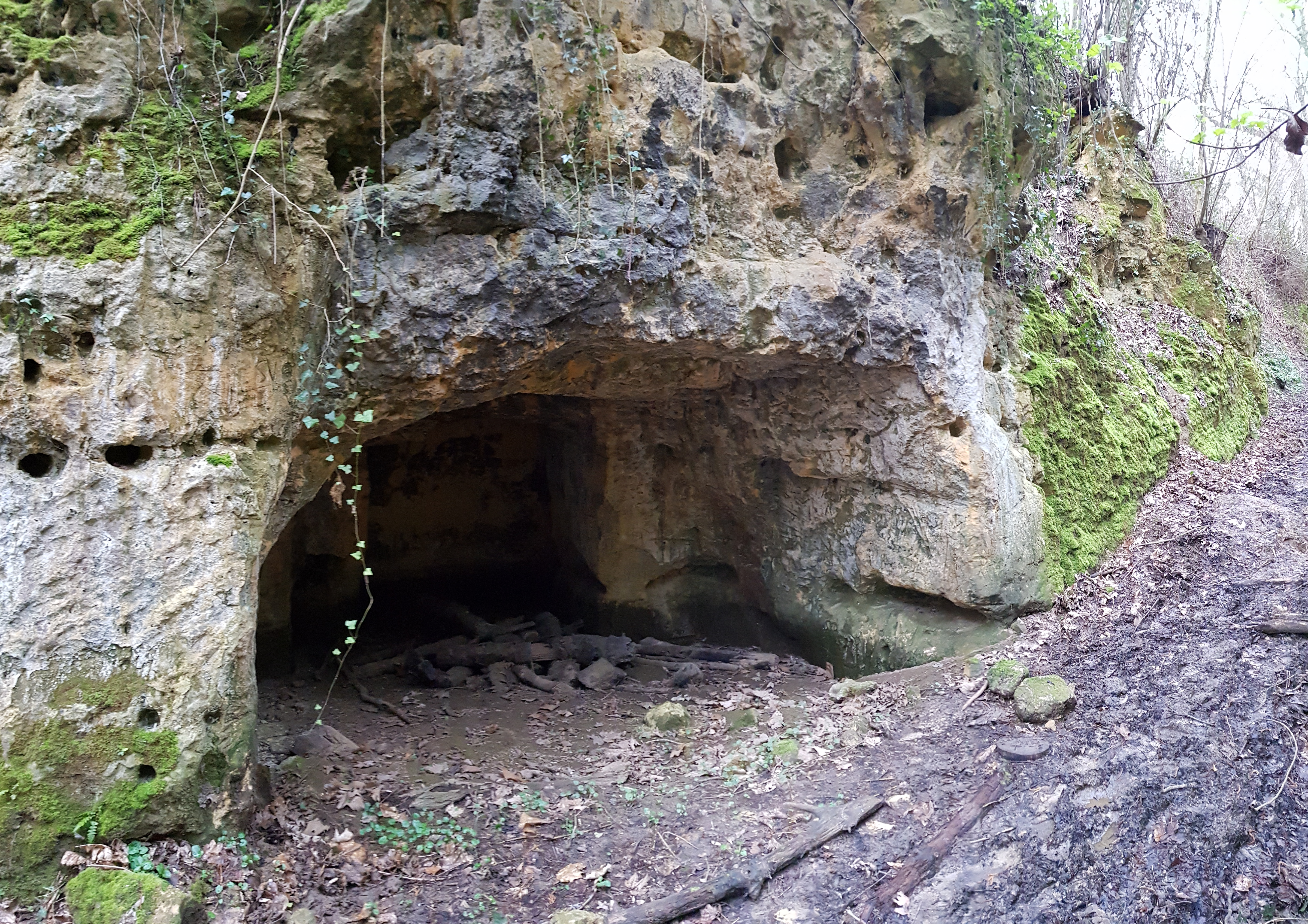 Bemelerbosgroeve III in holle weg Bemelen-Gasthuis, Bemelen, Nederland